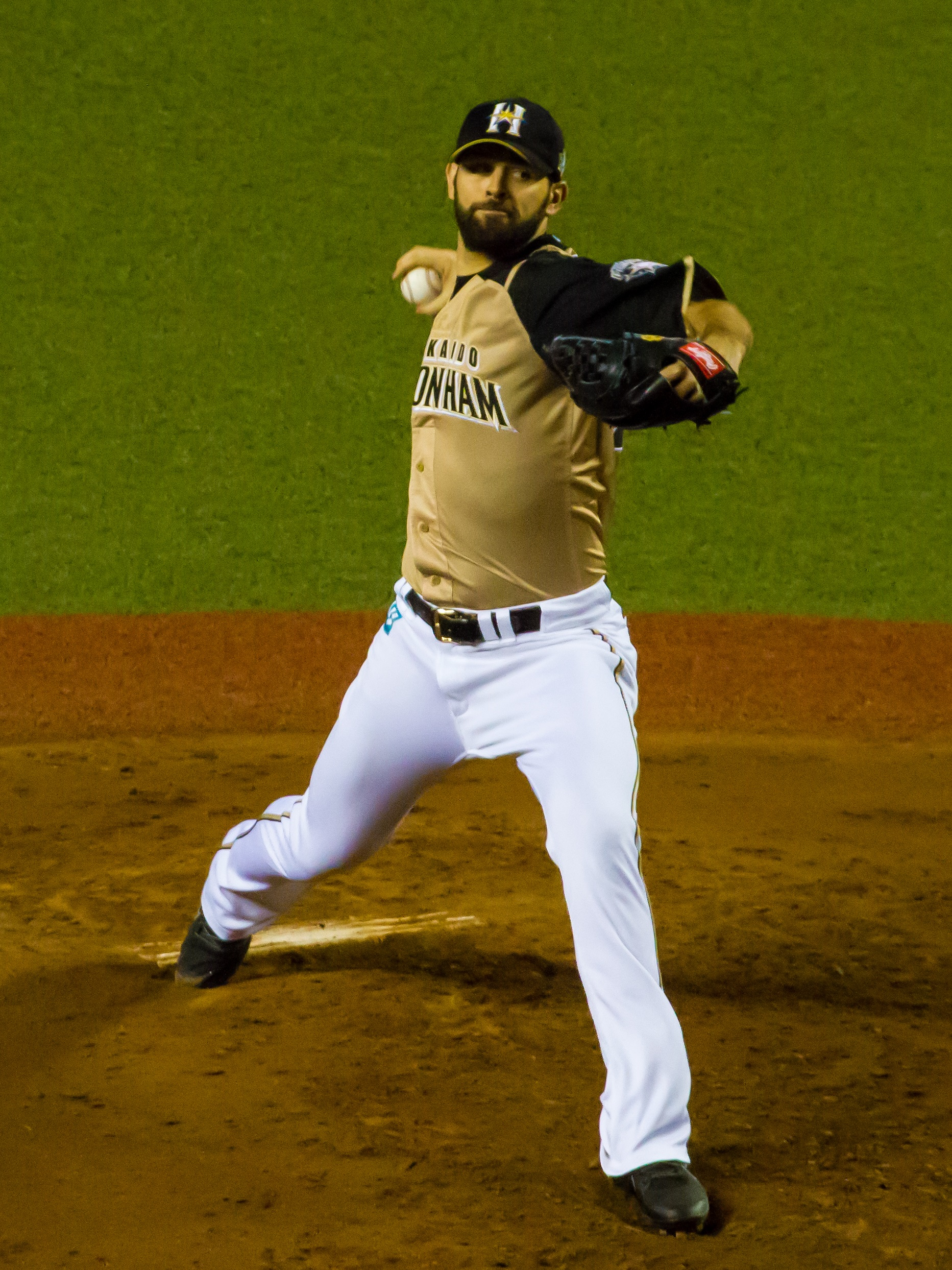 北海道日本ハムファイターズ投手のニック・マルティネス。